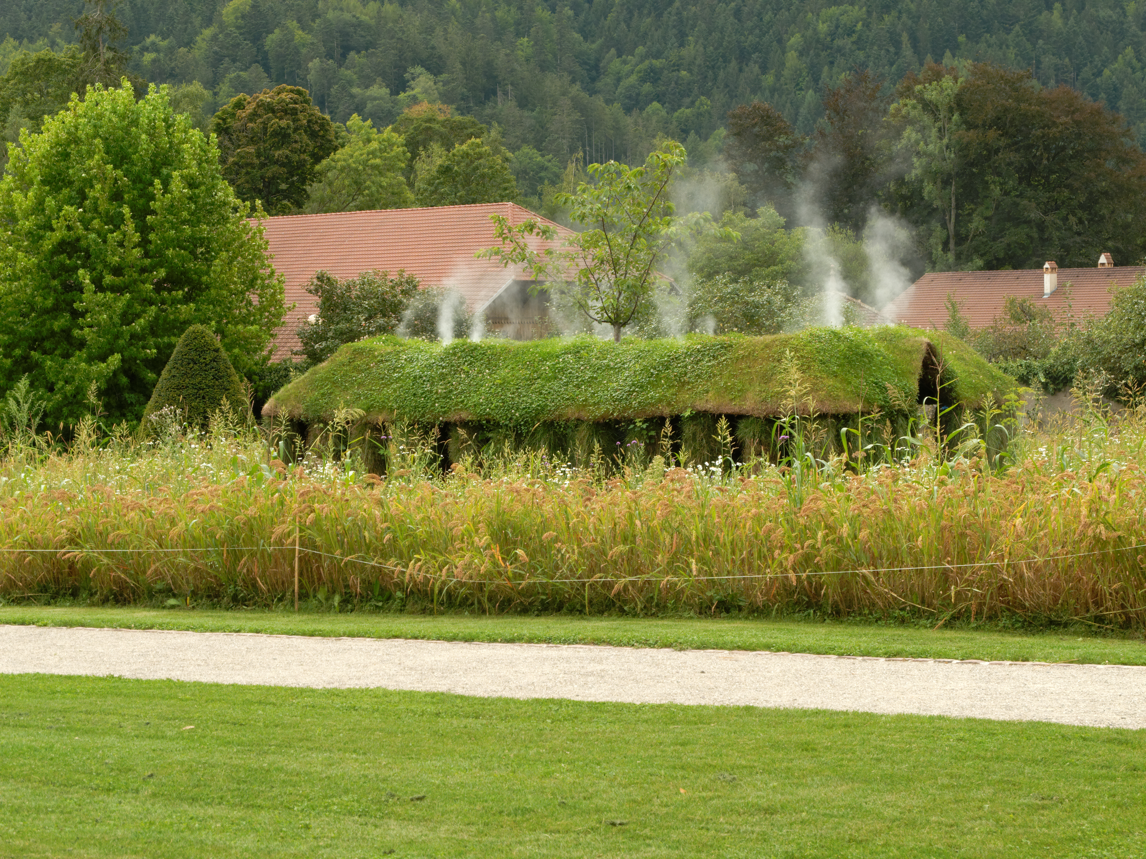 Parc de Wesserling : quelque part à l'intérieur.